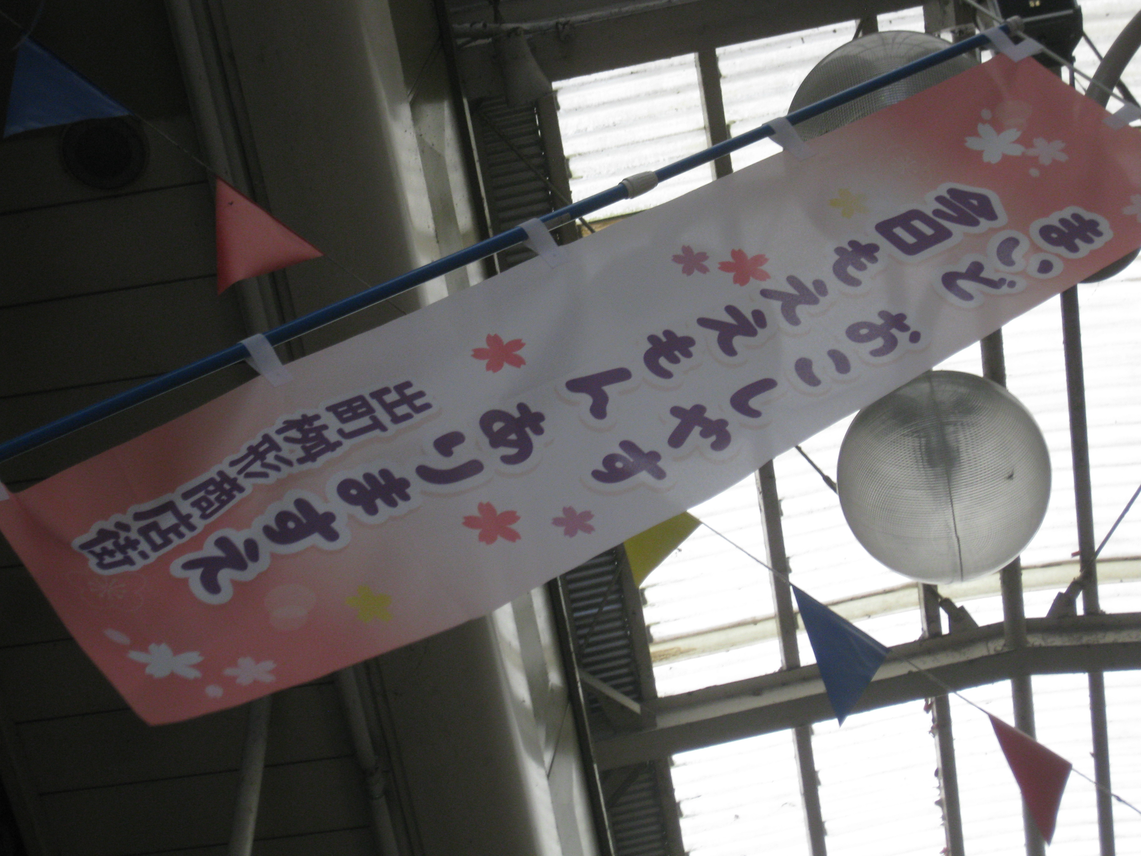 京都弁を用いた幟。出町桝形商店街にて。